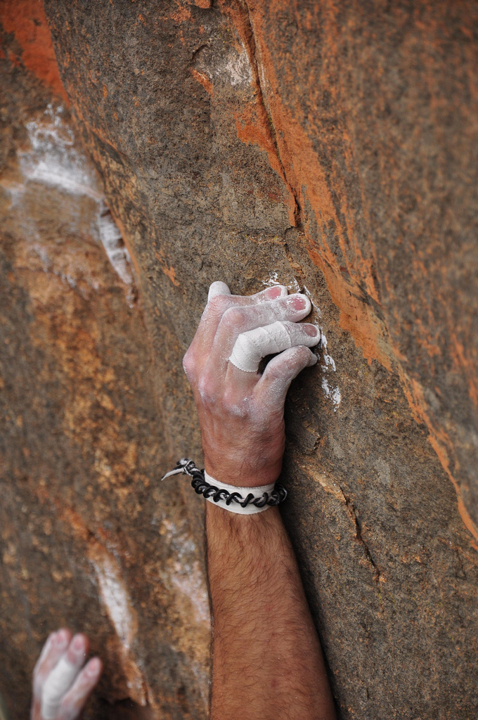 Main arquée sur une prise sur le rocher lors d'une ascension en falaise.